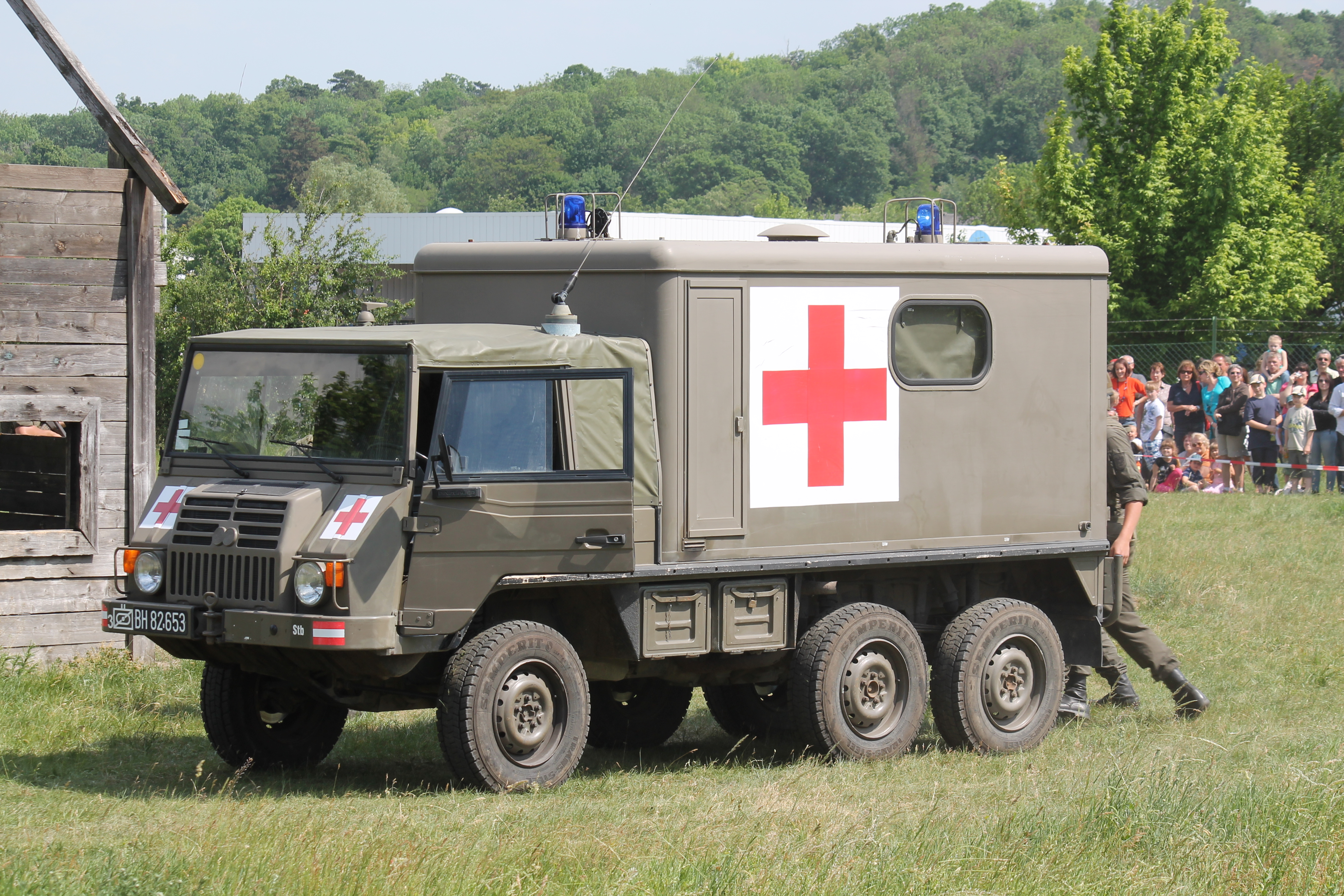 Sanitäts-Pinzgauer des Aufklärungs- und Artilleriebataillons 3 (AAB 3) bei einer Gefechtsvorführung.